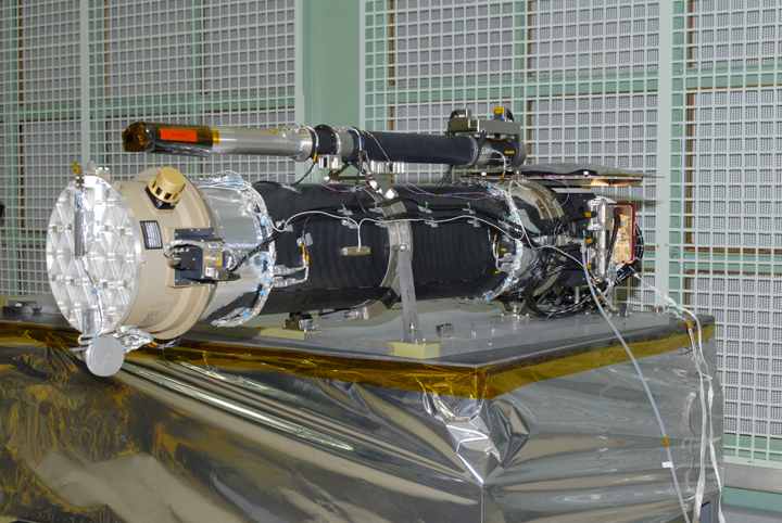 Solar Dynamics Observatory, Atmospheric Imaging Assembly instrument